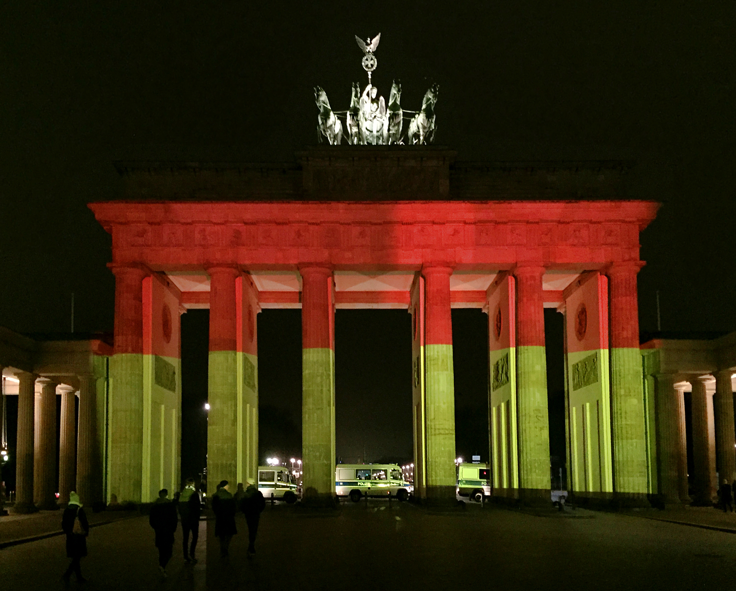 2016 Berlin Christmas market truck attack